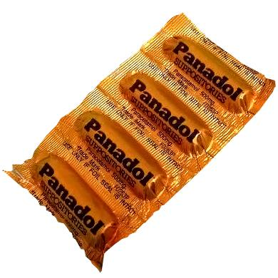 Panadol suppositories.